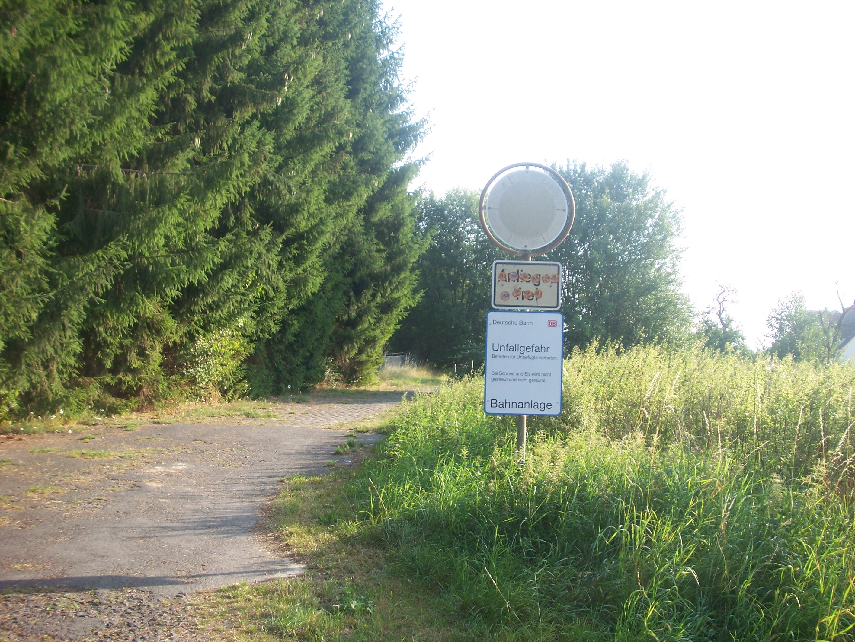 Schild am ehemaligen Bahnhof Klein Berkel (Begatalbahn [Bahnstrecke Hameln-Lage])